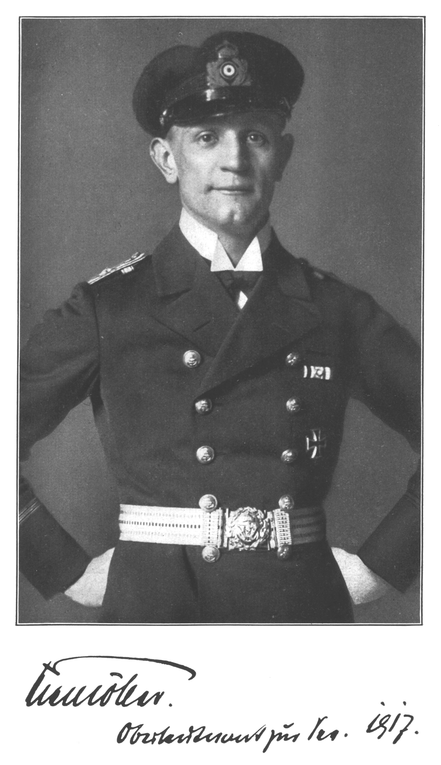 Martin Niemöller als Marineoffizier, Oberleutnant zur See